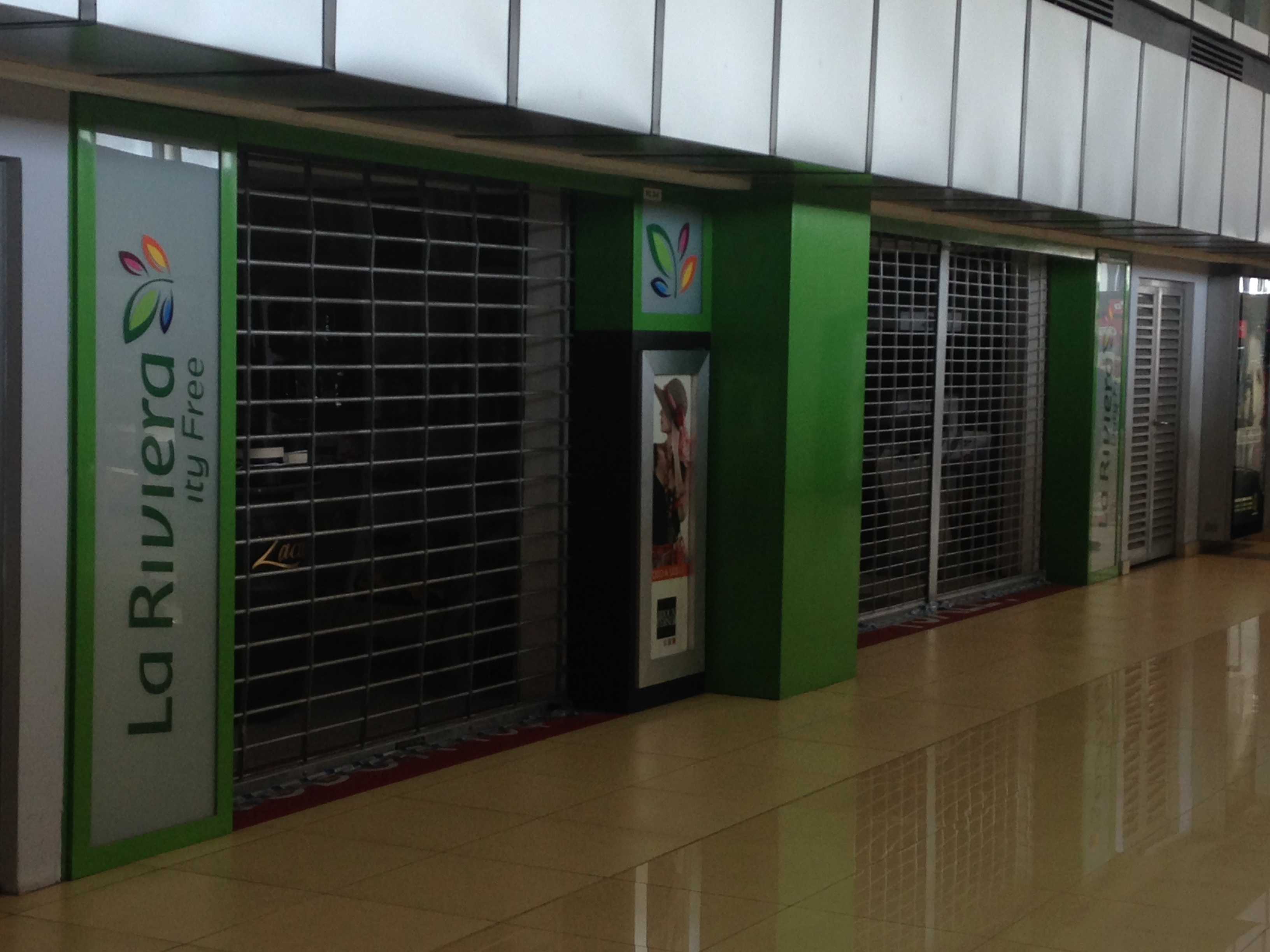 Tiendas "La Riviera" cerradas por el Ministerio Público guatemalteco en las instalaciones del Aeropuerto Internacional La Aurora.